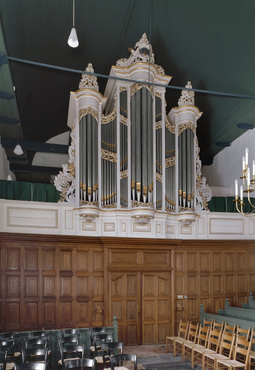 Nederlands Hervormde Kerk: Interieur, aanzicht orgel, orgelnummer 188 (opmerking: Gefotografeerd voor Het Historische Orgel in Nederland 1865-1872)